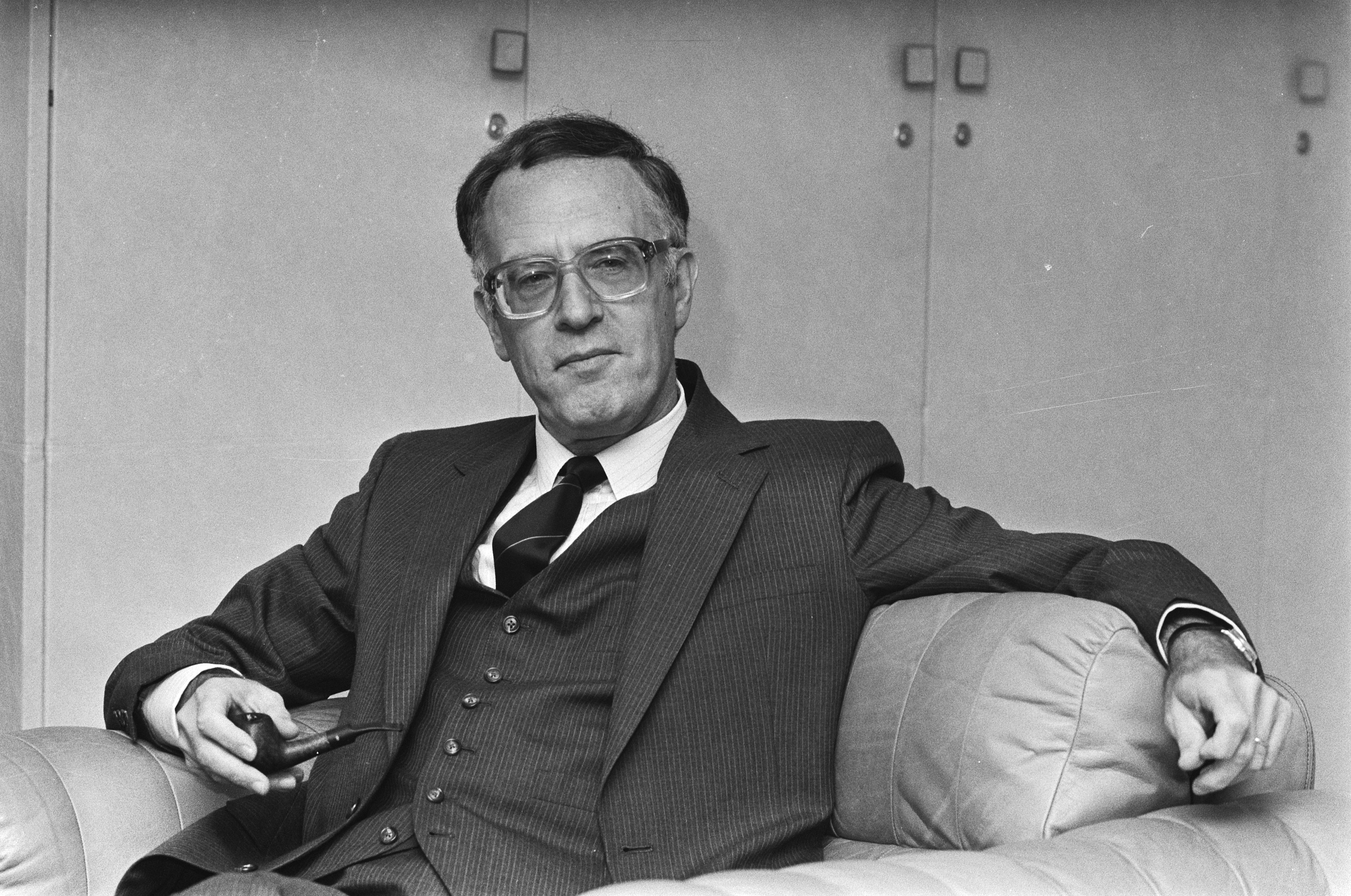 Collectie / Archief : Fotocollectie Anefo Reportage / Serie : [ onbekend ] Beschrijving : De heer W.E. Scherpenhuijsen Rom , lid Raad van Bestuur NMB, opdracht Financieel Dagblad , kop Datum : 11 december 1985 Persoonsnaam : Raad van Bestuur Instellingsnaam : NMB Fotograaf : Bogaerts, Rob / Anefo Auteursrechthebbende : Nationaal Archief Materiaalsoort : Negatief (zwart/wit) Nummer archiefinventaris : bekijk toegang 2.24.01.05 Bestanddeelnummer : 933-5097